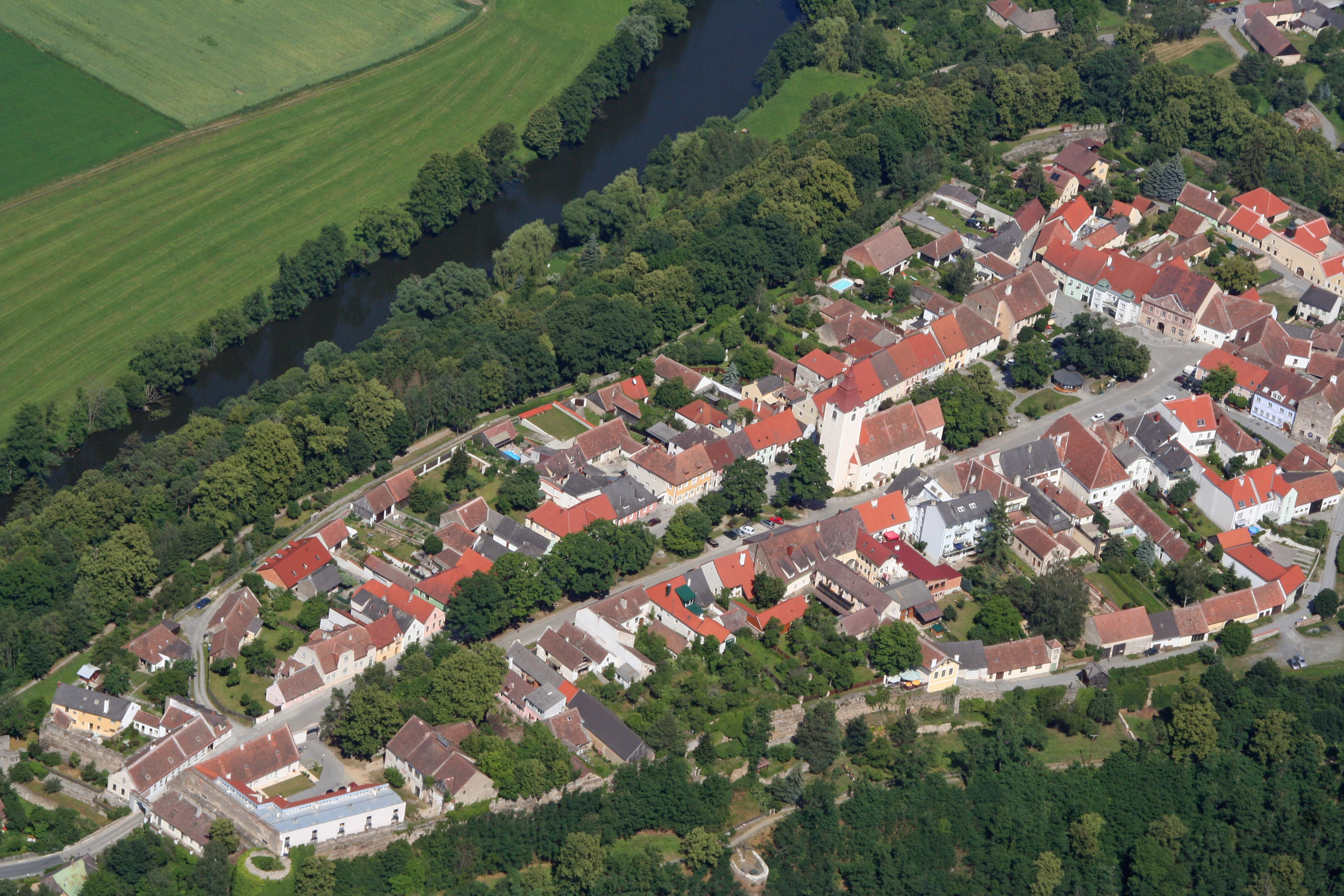 Hauptplatz von Drosendorf-Stadt (Gemeinde Drosendorf-Zissersdorf / Niederösterreich), Ansicht von Westen